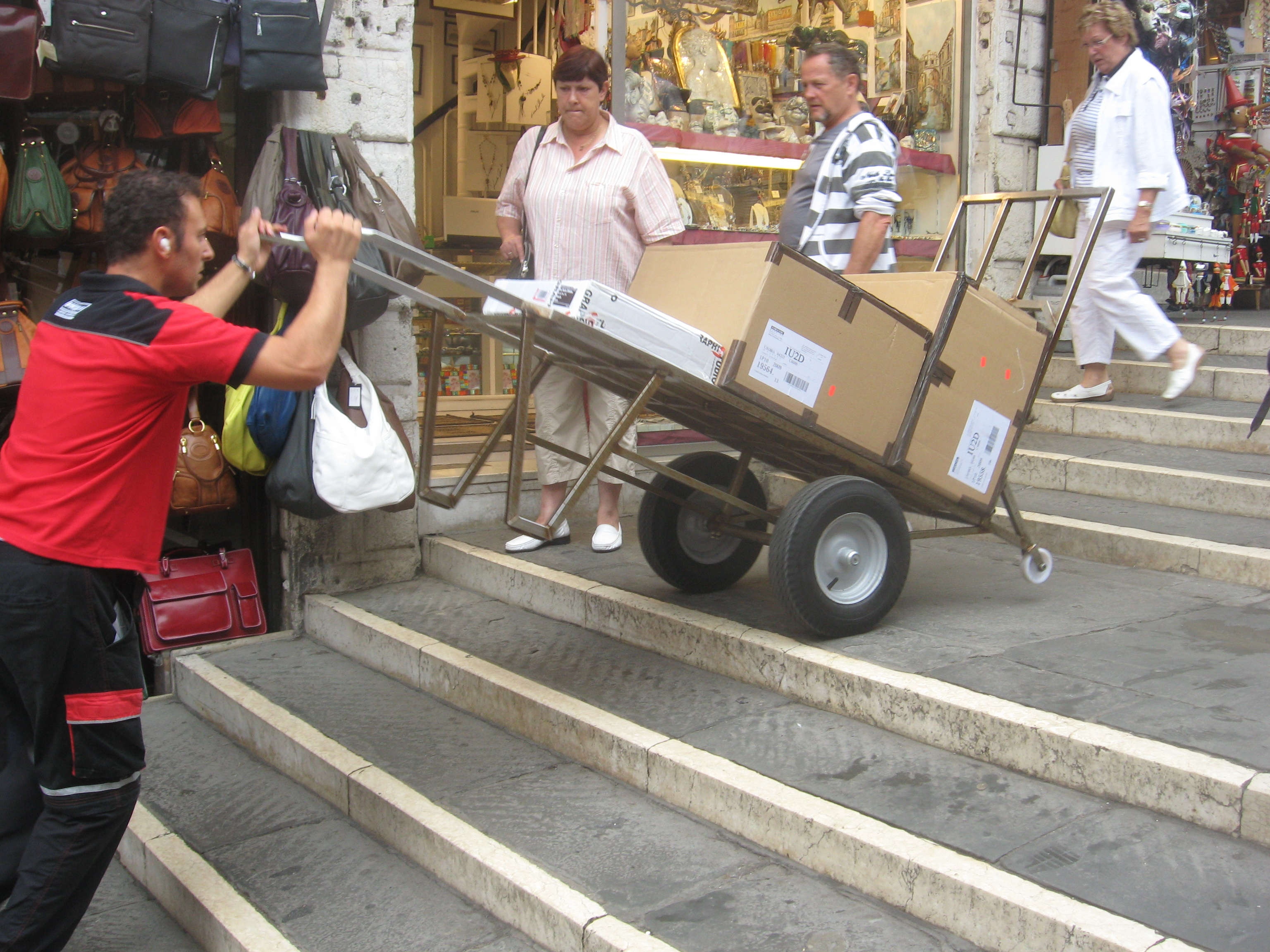 Venezianischer Lastkarren